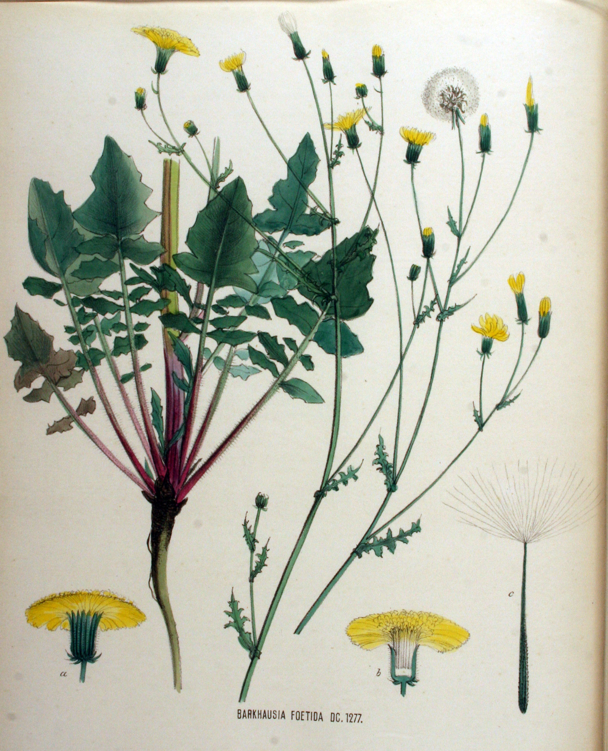 Crepis foetida L. (Syn. Barkhausia foetida (L.) F.W. Schmidt)